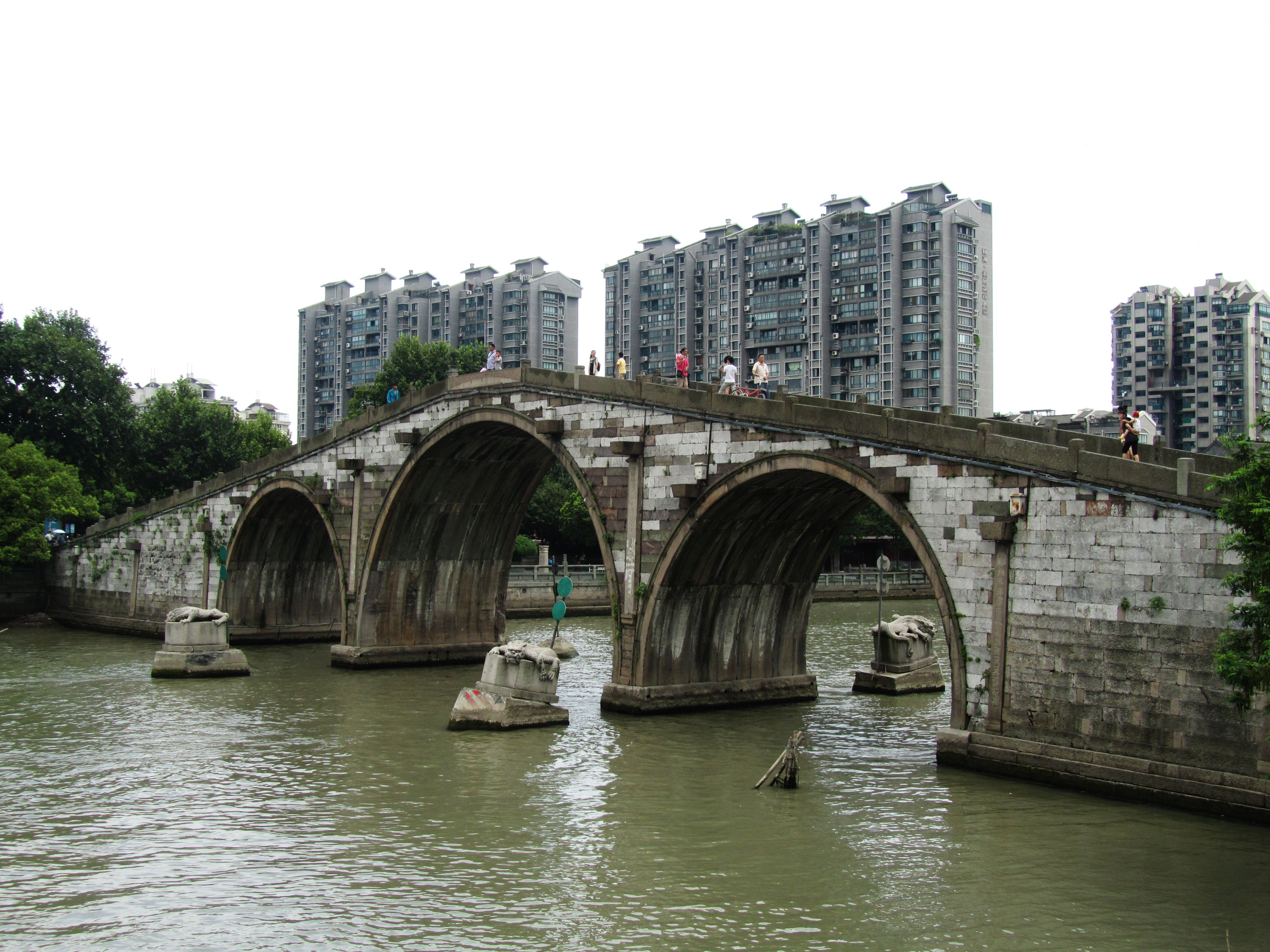 杭州拱宸桥，自西北侧看桥侧面。